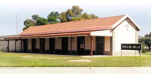 Estación de tren del pueblo